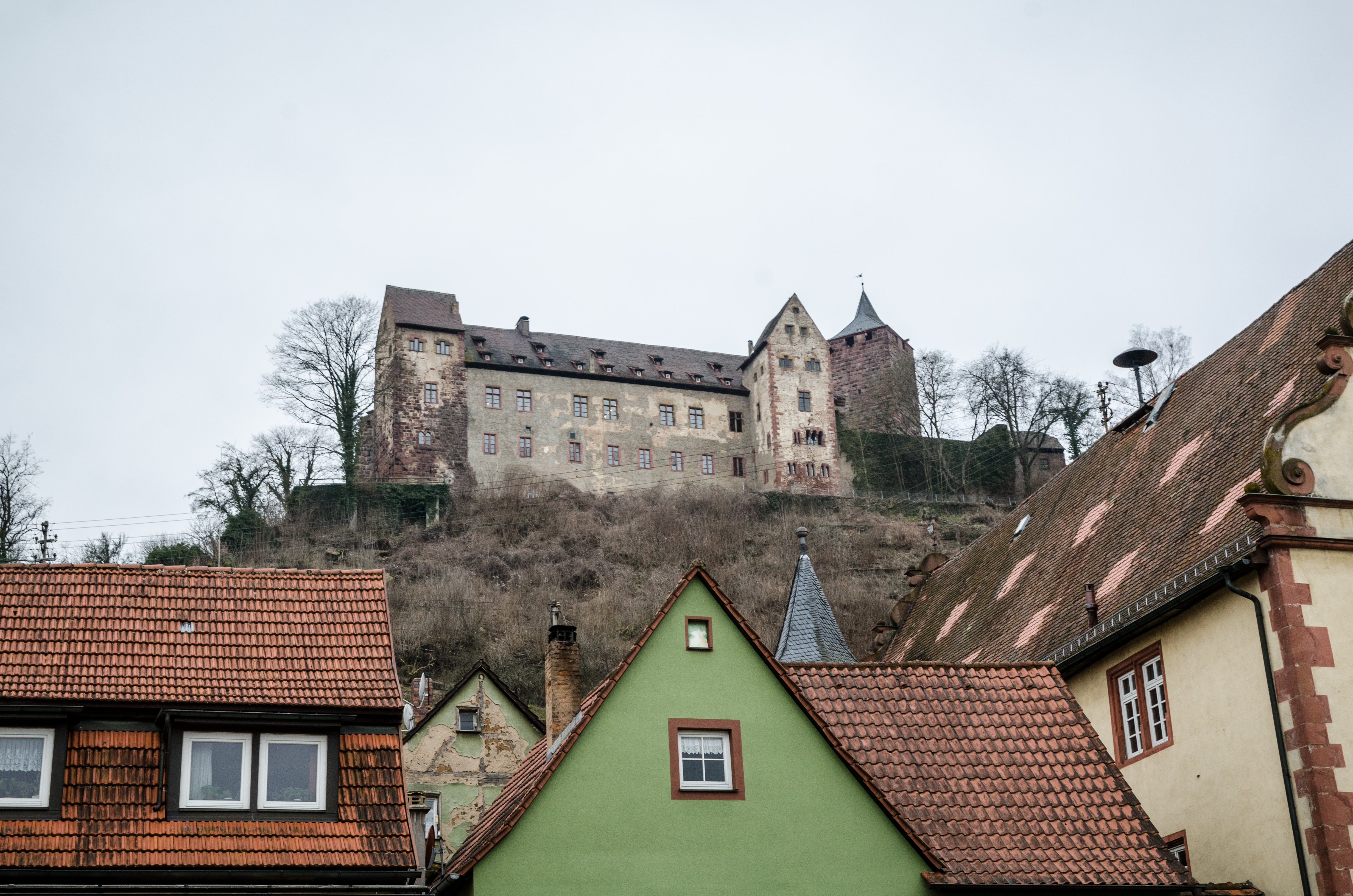 Rothenfels, Burg von der Stadt aus betrachtet